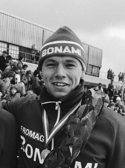 Sies Uilkema gehuldigd als Nederlandse kampioen schaatsen sprint 1983, in Utrecht.